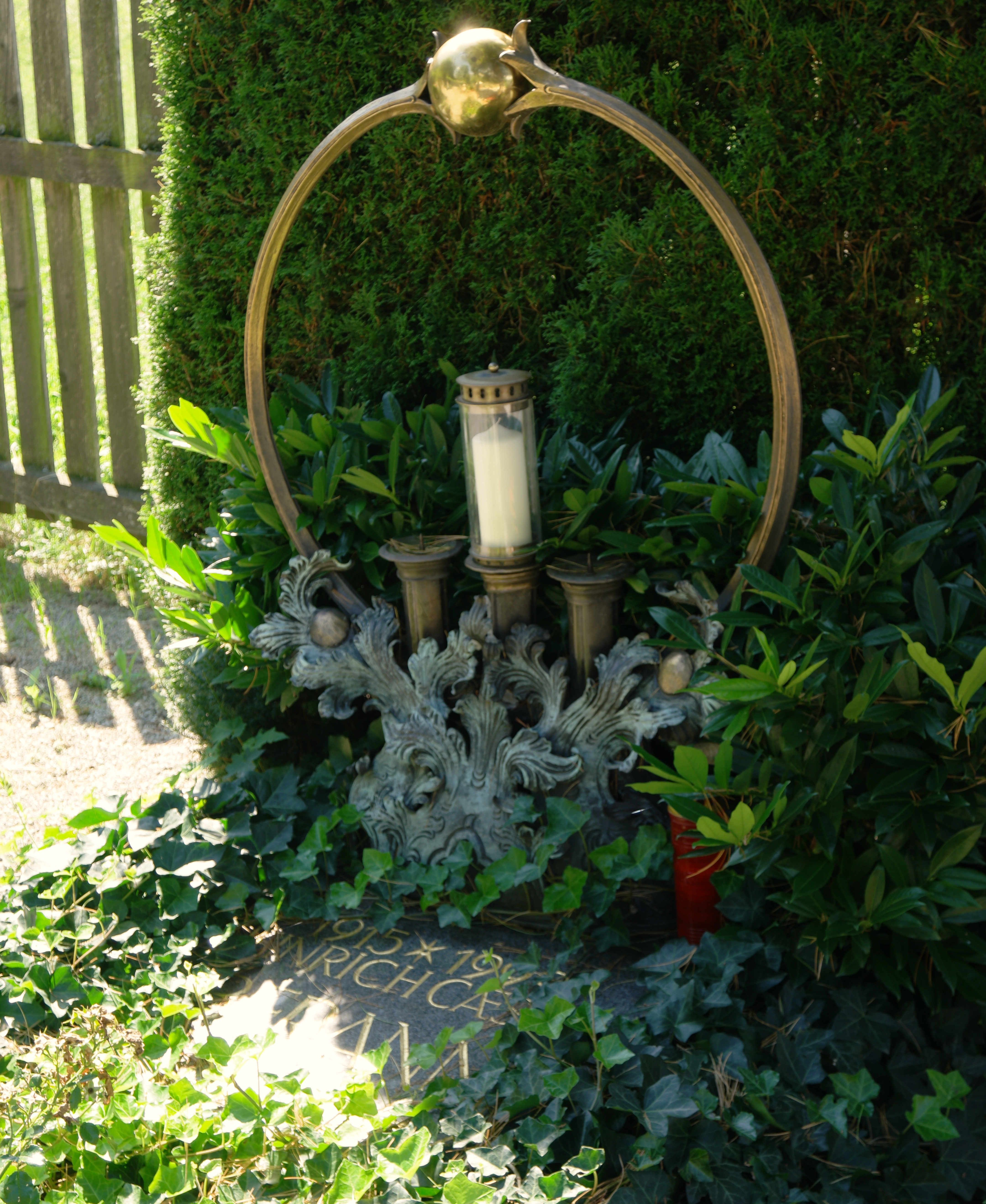 Grab des Grafikers Heinrich Caesar Berann (1915-1999) auf dem Neuen Friedhof Mühlau, Innsbruck